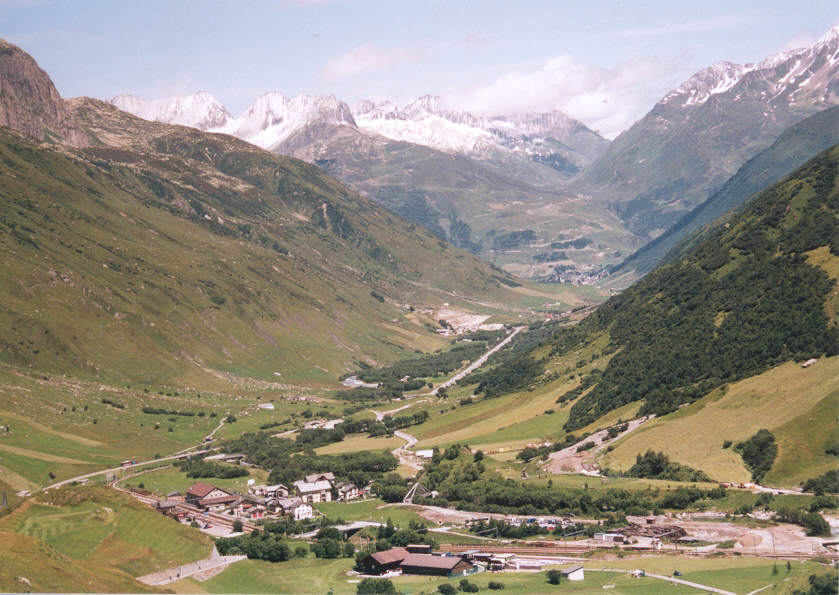 Uitzicht van de Furkapasweg terug het Urserental in. Op de voorgrond Realp met zowel het treinstation van de MGB als de DFB. Foto zomer 2001, Angélique Leunissen